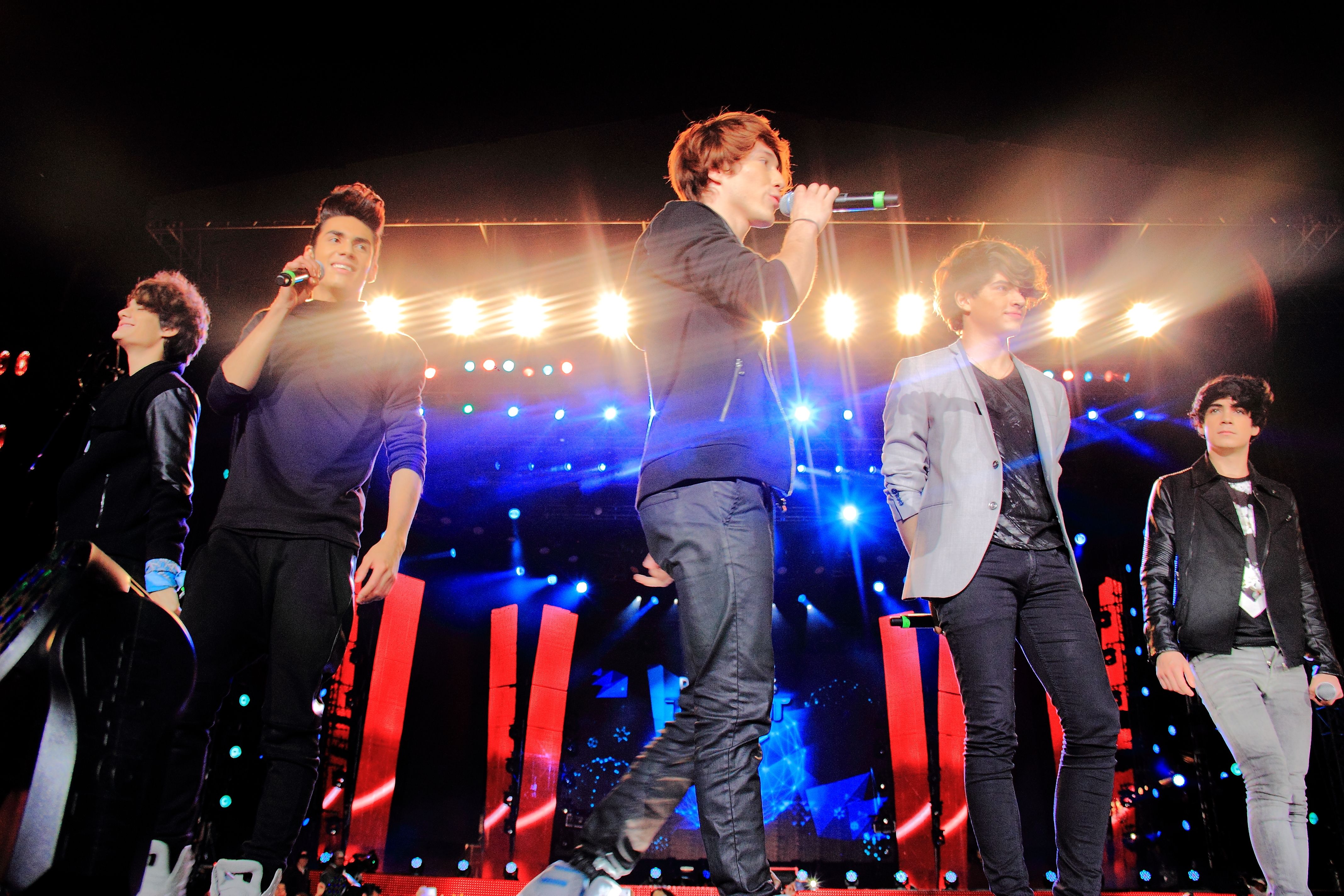 Integrantes de CD9 durante una interpretación en el concierto de los Premios Telehit, en el Foro Sol, Ciudad de México, Distrito Federal.